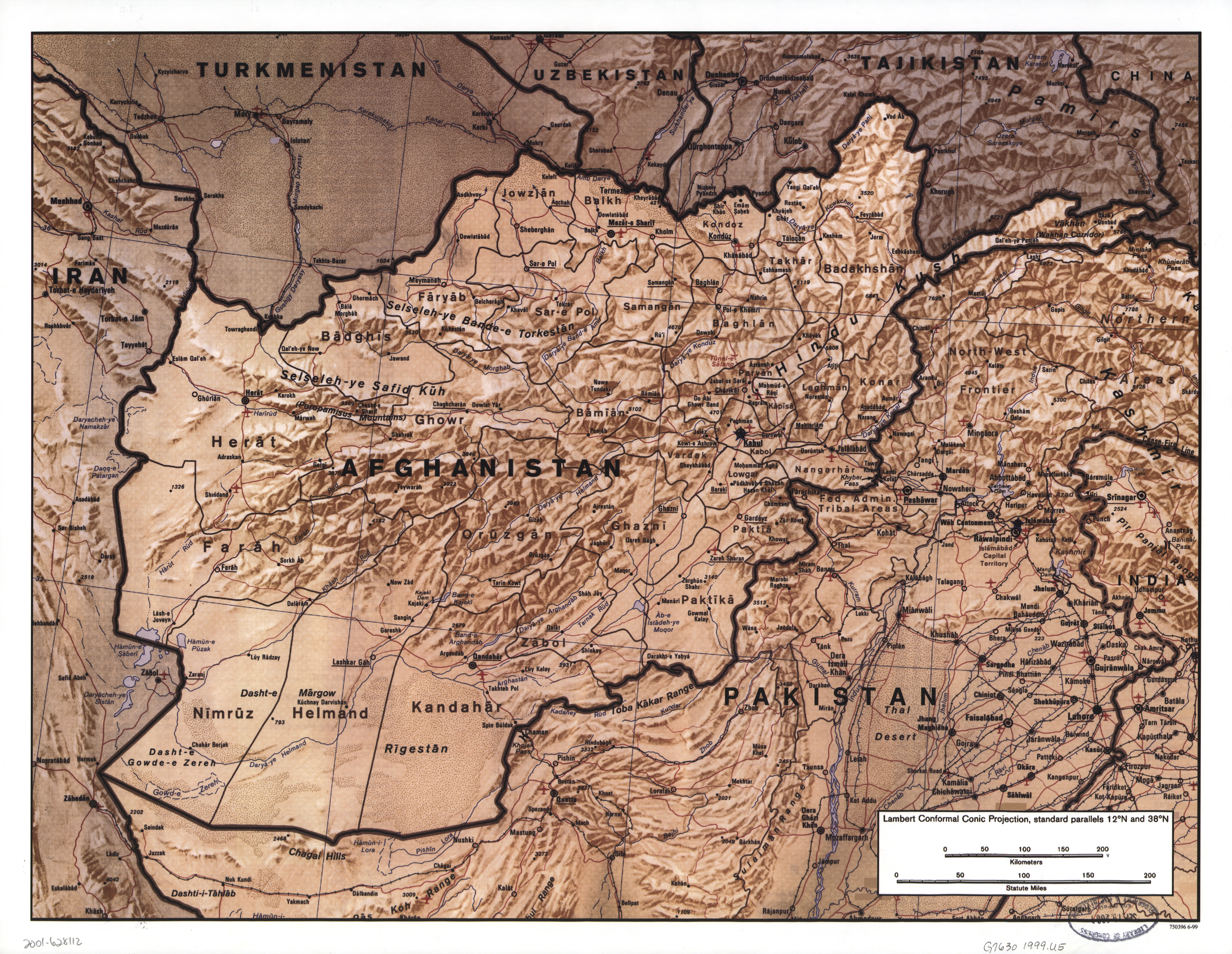 1999 Afghanistan